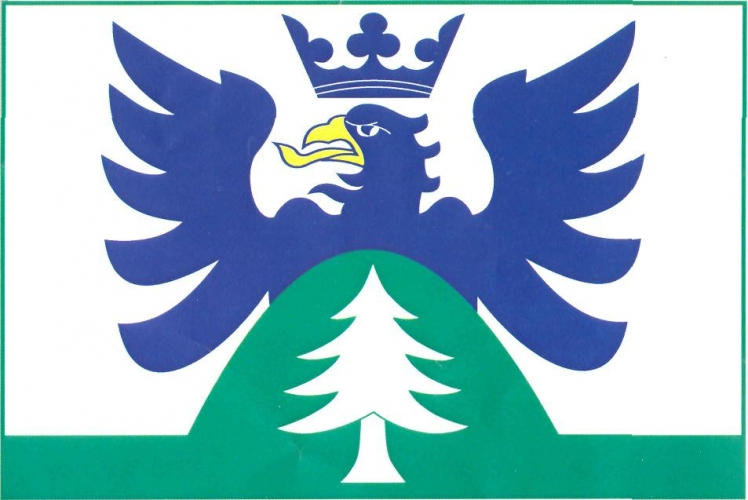 vlajka,Orlické Záhoří , okres Rychnov nad Kněžnou